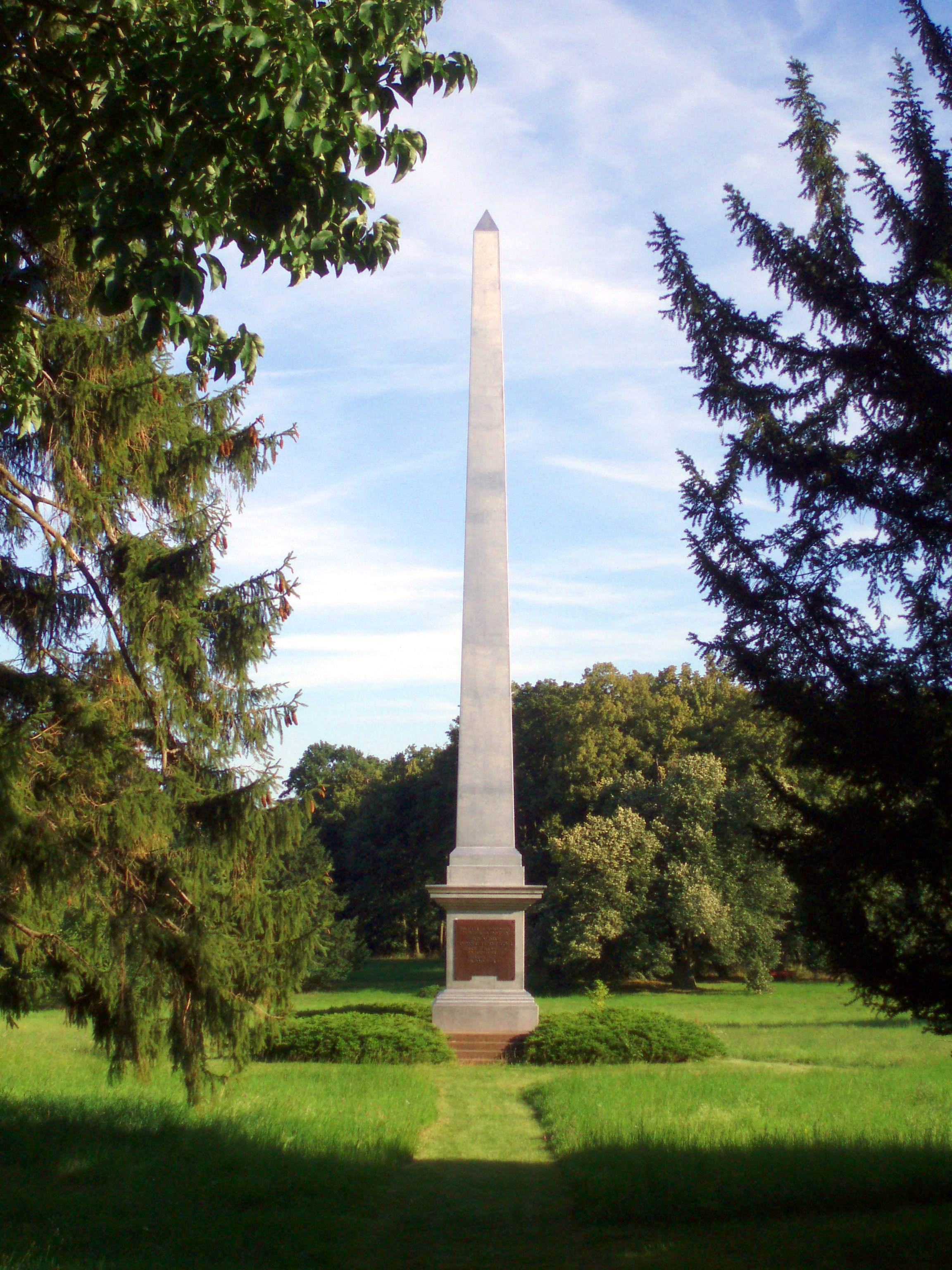 Degenerobelisk im Landschaftspark Degenershausen